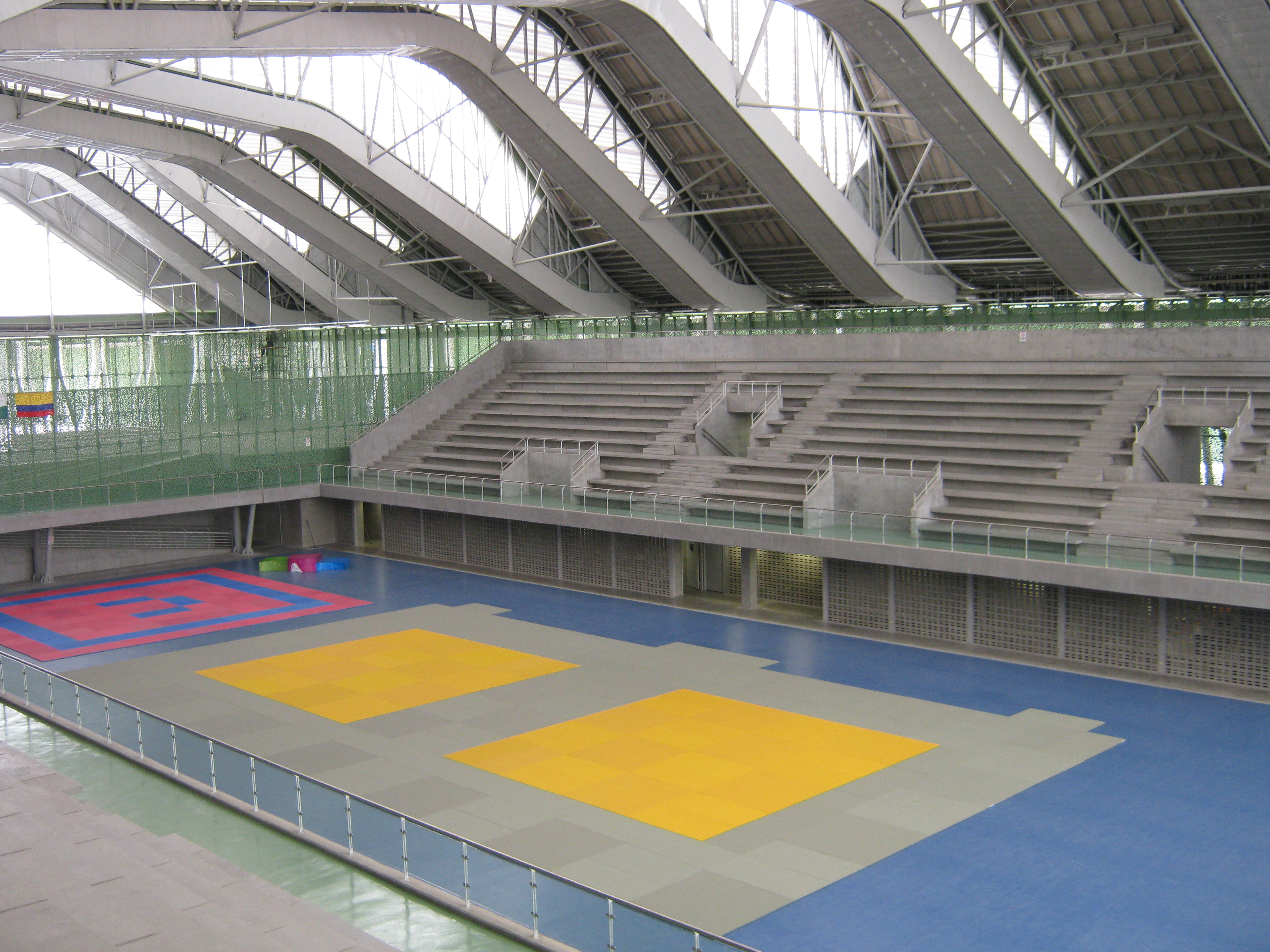 Interior del Coliseo de Combate, en la Unidad Deportiva Atanasio Girardot. Medellín. Colombia.